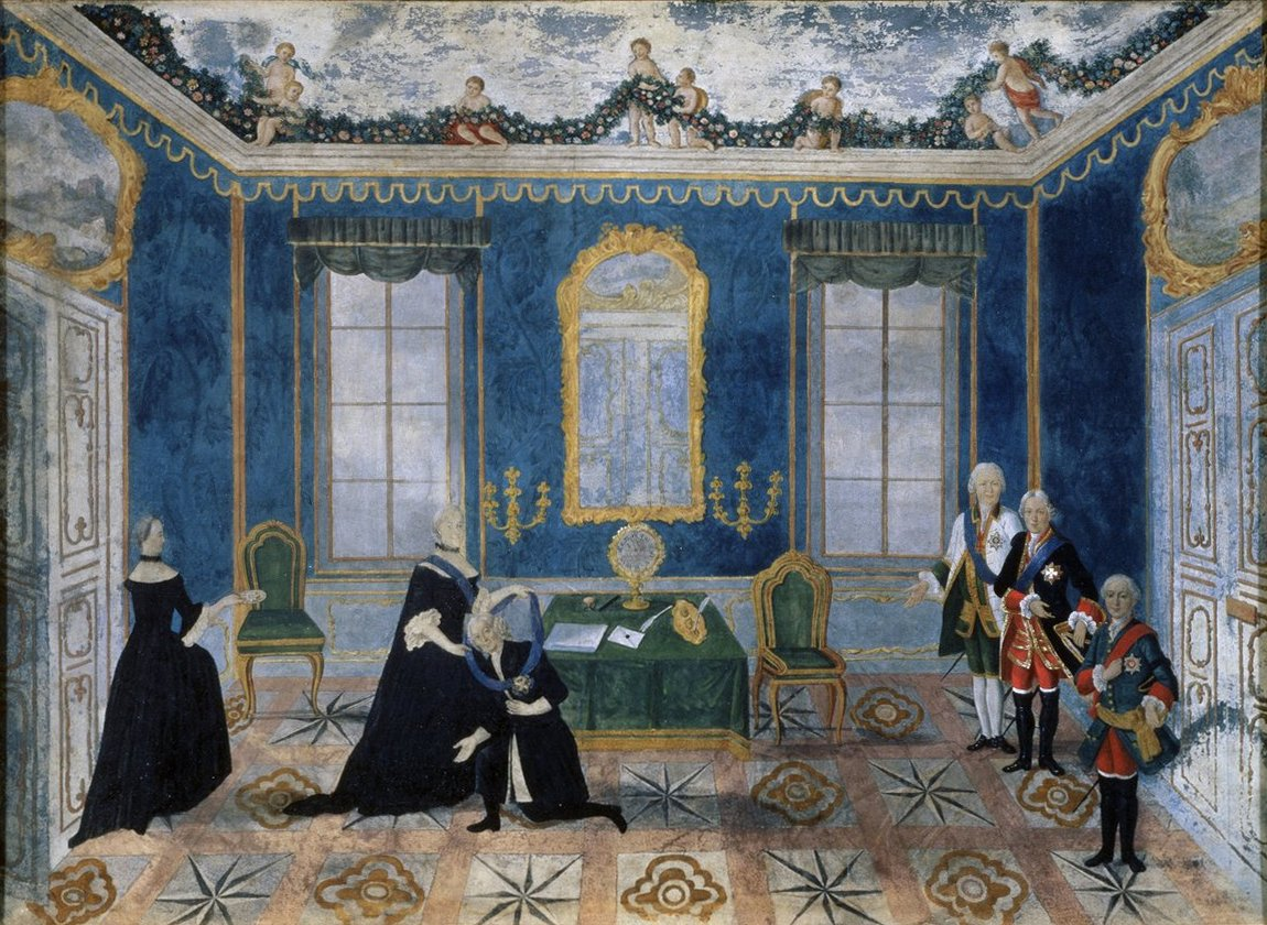 Возвращение графа Алексея Петровича Бестужева из подмосковной ссылки. Описание изображения из источника: Императрица Екатерина II принимает его 12 июля 1762 года в петербургском Летнем дворце (Моск. Ведомости 1762 г. № 61). Императрица возлагает на преклонившего колено Бестужева Андреевскую ленту; за императрицей фрейлина Ек. Ник. Чоглокова, выйдя из полуоткрытой двери, подносит звезду. Вправо, вдоль стены родные Бестужева: двоюродный брат адмирал Ив. Лук. Талызин (известный участник переворота); любимый племянник (посланный за дядей рано утром 28 июня) генерал аншеф и подполковник л.-гв. Конного полка кн. Мих. Никит. Волконский и сын генерал-поручик граф Андрей. Императрица, Чоглокова и А.П. Бестужев — в чёрных платьях, дамы — с рюшкой на шее, Бестужев в белых больших перчатках, остальные с траурной повязкой по импер. Петру III. Талызин в белом адмиральском мундире с золотым галуном, с зелёными отворотами воротника и рукавов, зеленом камзоле с золотым галуном и зелёных штанах, в белых чулках и чёрных башмаках, при Андреевской ленте и звезде и с орденом св. Анны. Волконский в тёмно-фиолетовом мундире с золотым галуном и с красными отворотами, красный с золотым галуном камзол, красные штаны, высокие сапоги со шпорами, при звезде и ленте Белого Орла. Андрей Бестужев в серо-зелёном застёгнутом мундире с золотыми пуговицами и красными: воротником и отворотами рукавов, в золотом широком шарфе, в высоких сапогах со шпорами, при звезде и ленте Александровских. Все лица обращены к зрителю; Андрей Бестужев слишком моложав (ему было 40 лет); ордена верны. Стены синие с золотым багетом, обивка двух стульев и скатерть стола — зелёные с золотом. Акварель. Фототипический снимок картины. 9½ x 13¼ . Дар по завещанию М.М. Евреинова через душеприказчика гр. М.В. Толстого.